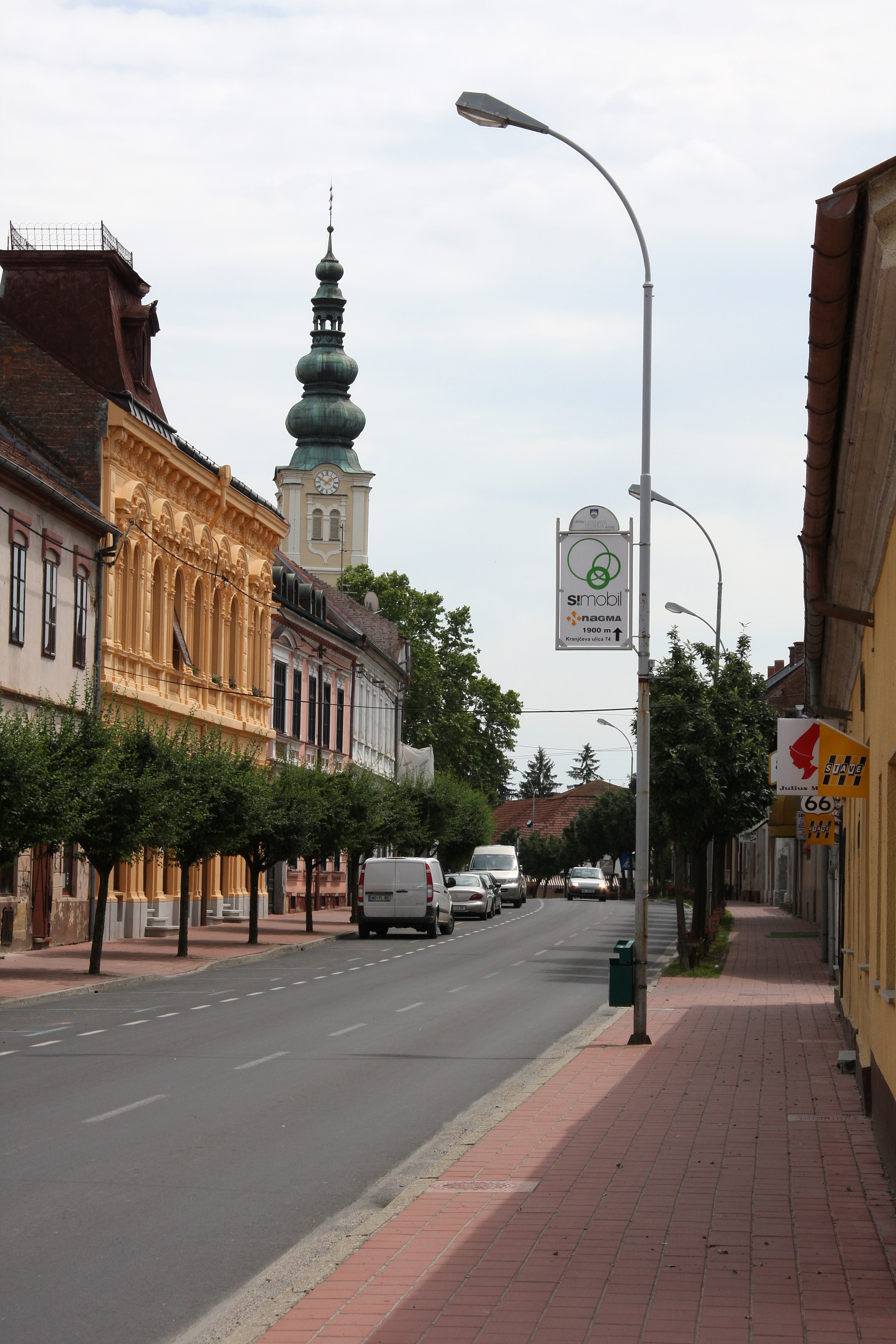 Glavna ulica v Lendavi.